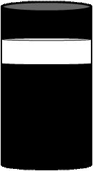 Cheminée utilisée par les navires de l'Inman Line au XIX° siècle (1850 à 1893)